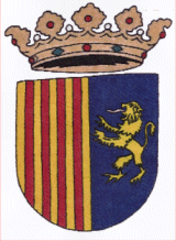 escudo de Lechago, Calamocha (Teruel)